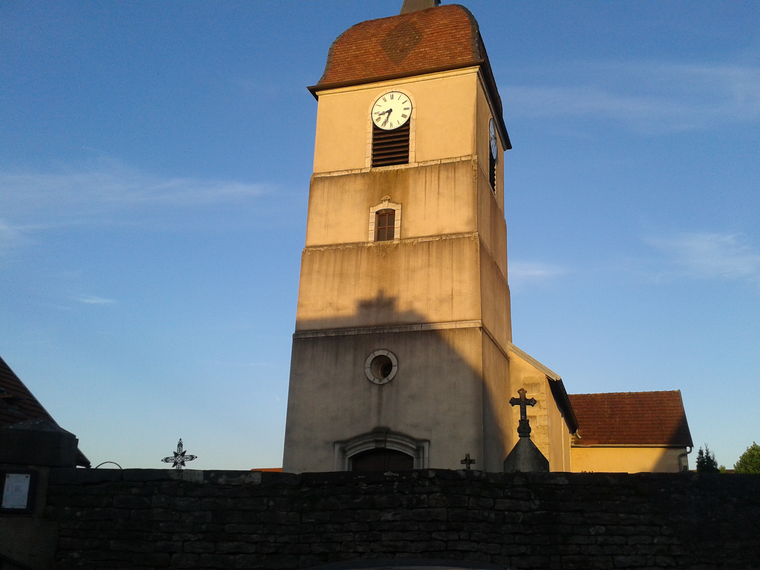 L'église de Quincey